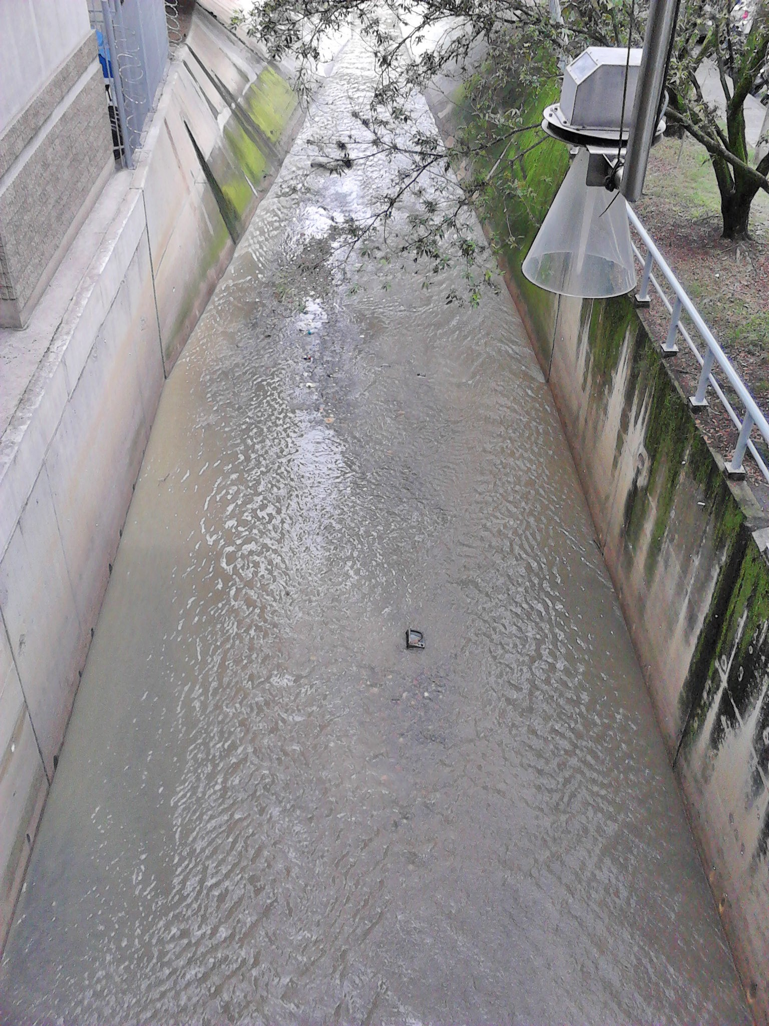 Quebrada La Hueso desde la estación Floresta del Metro de Medellín